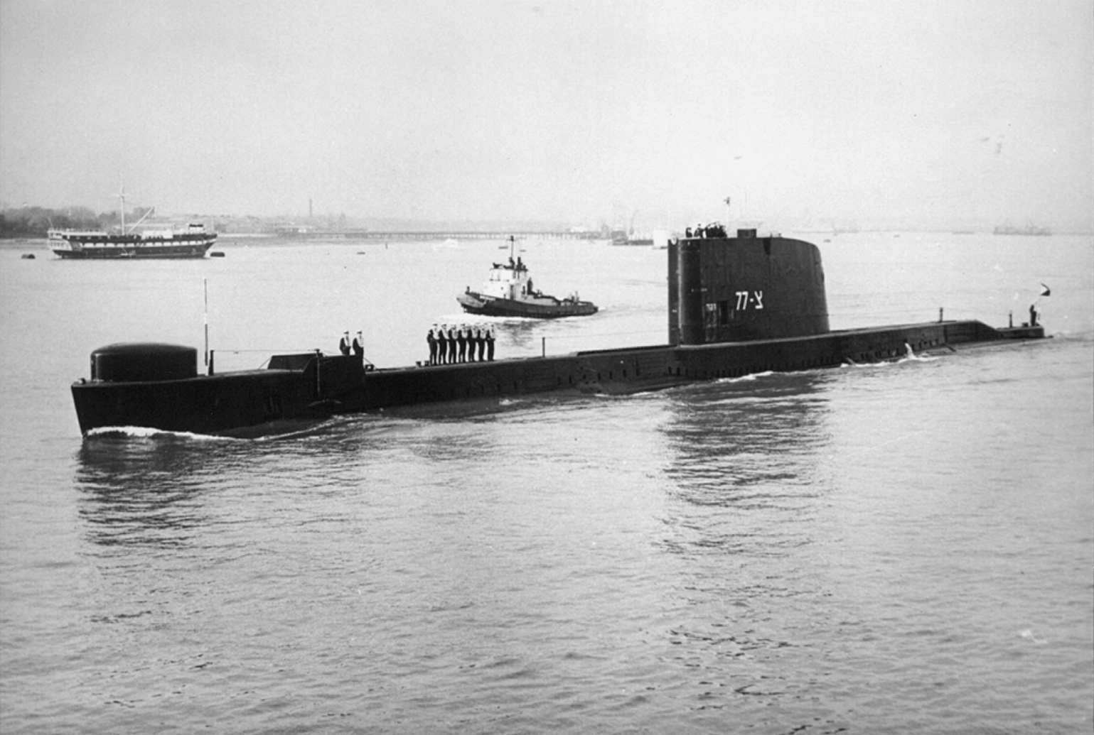 הצוללת אחי דקר.